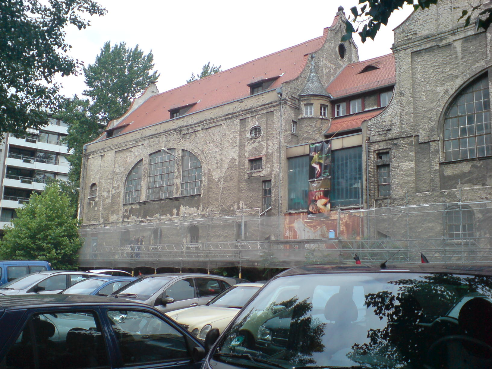 Heidelberg, Germany